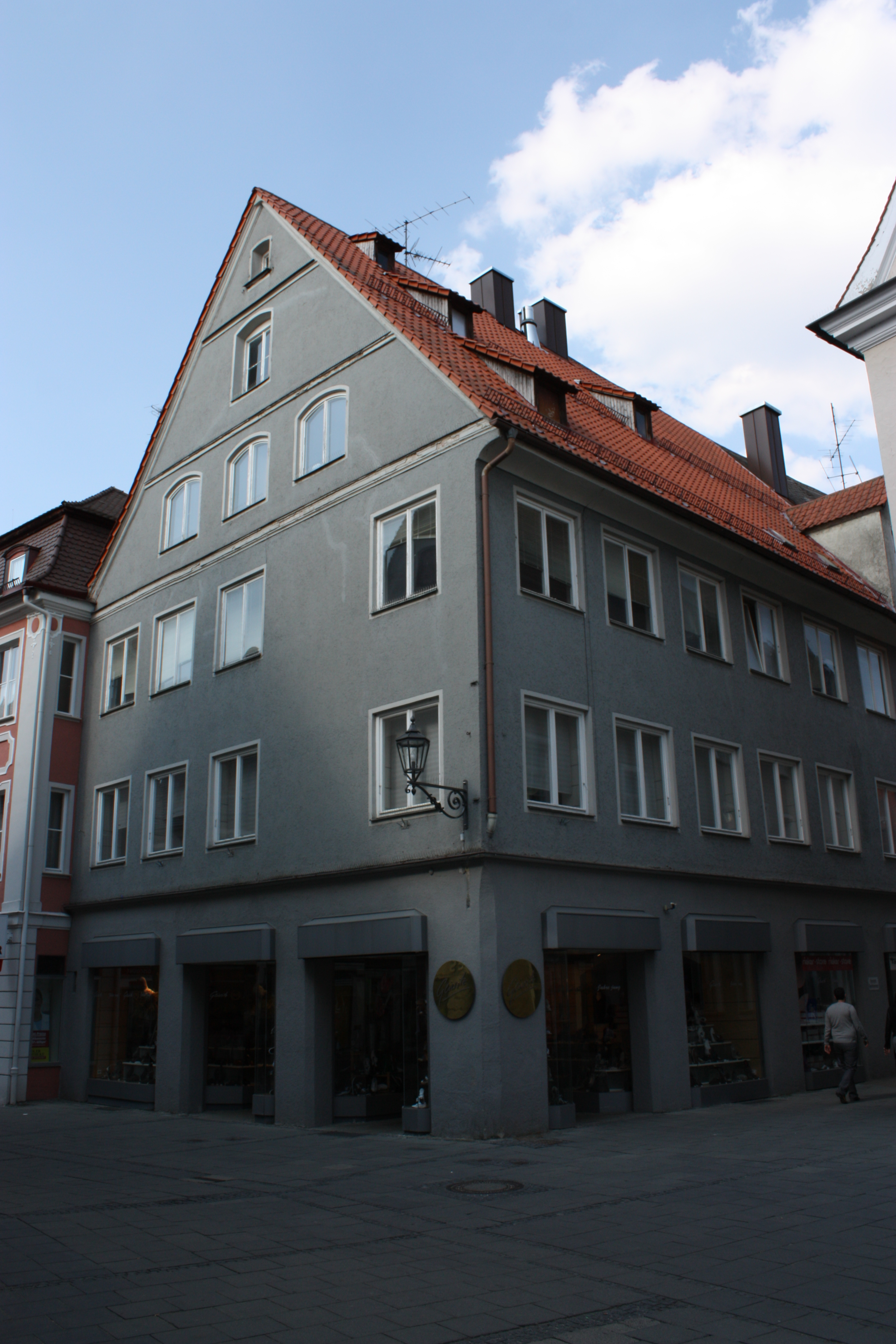 Hausfassade in der Kramerstraße im oberschwäbischen Memmingen. Fußgängerzone der Stadt und ehemalige Bundesstraße 19.